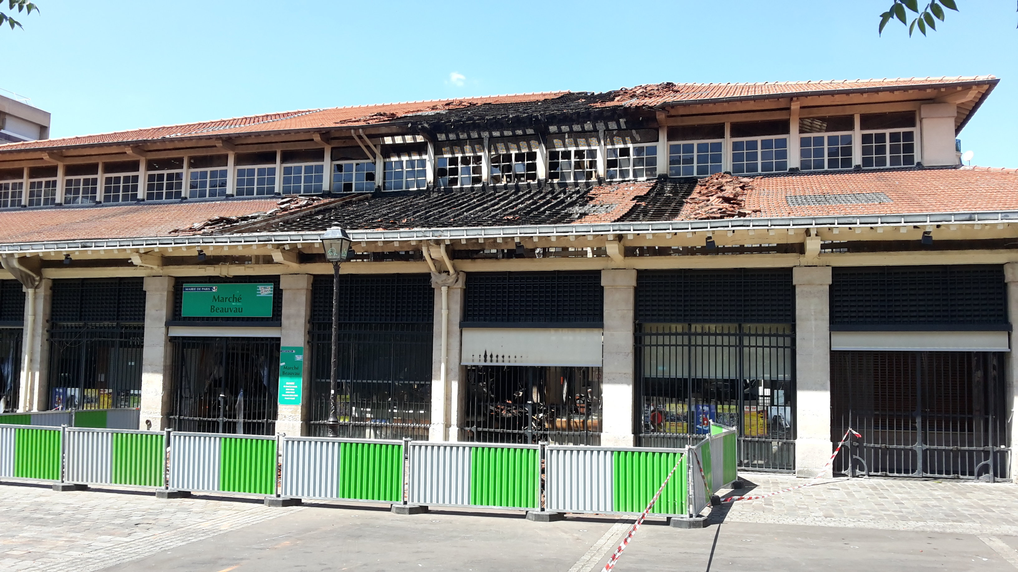 Le marché Beauvau, place d'Aligre à Paris, le matin de l'incendie du 6 juillet 2015.